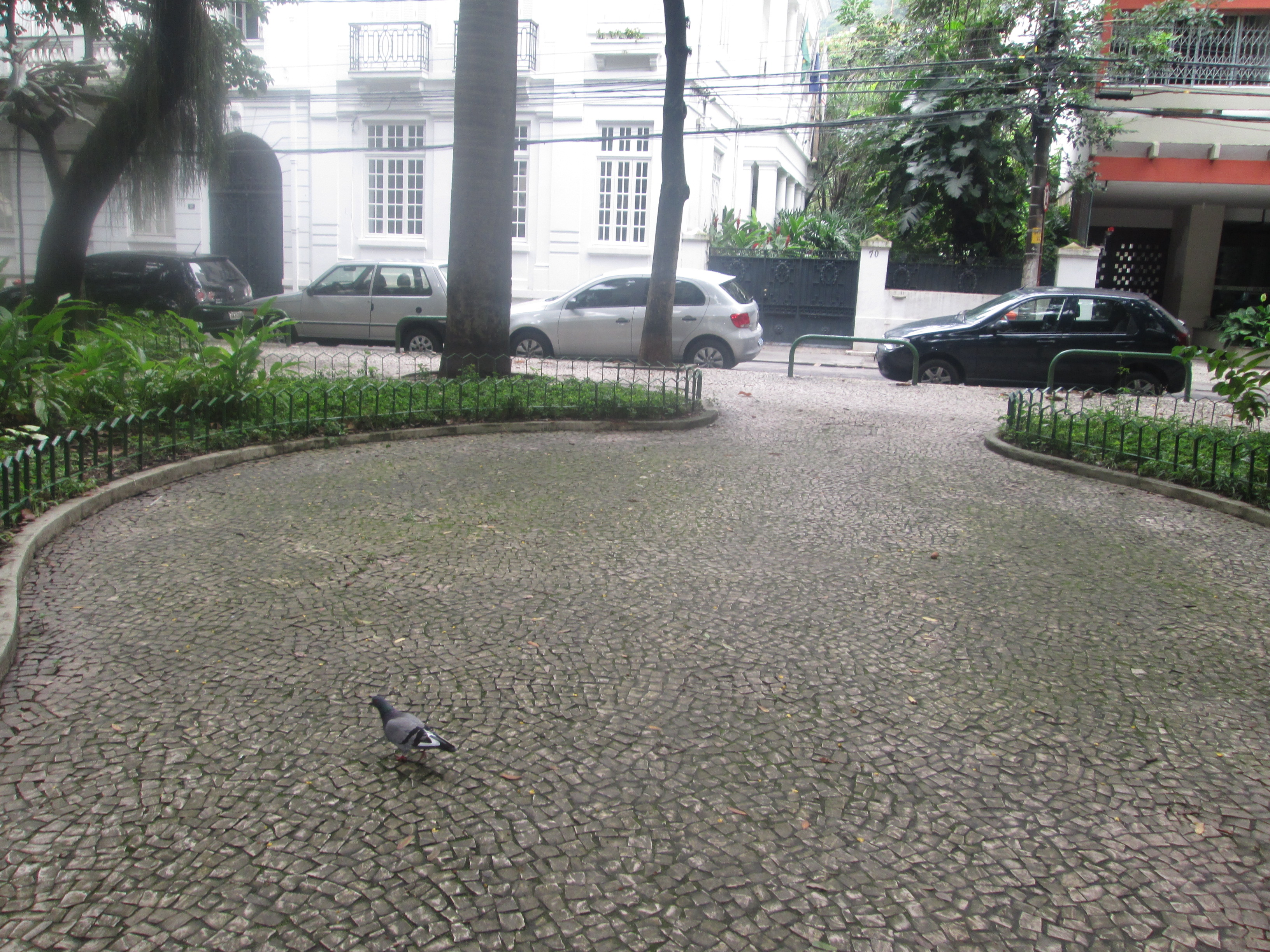 Vista do Largo dos Leões, em Humaitá, Rio de Janeiro, Brasil.